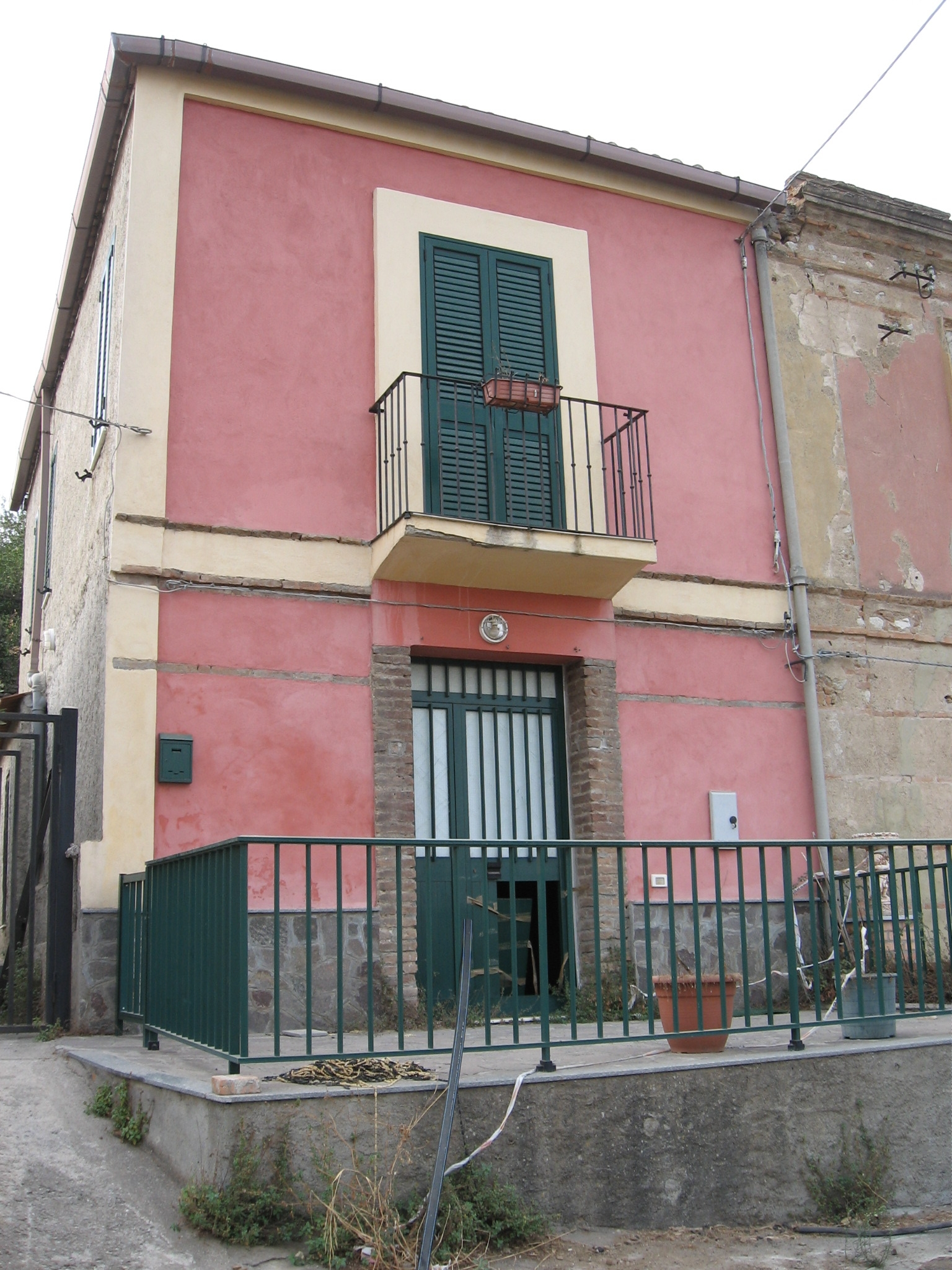 Il luogo dell'arresto di Pasquale Condello a Occhio di Pellaro (Reggio Calabria), in Via Filici II.